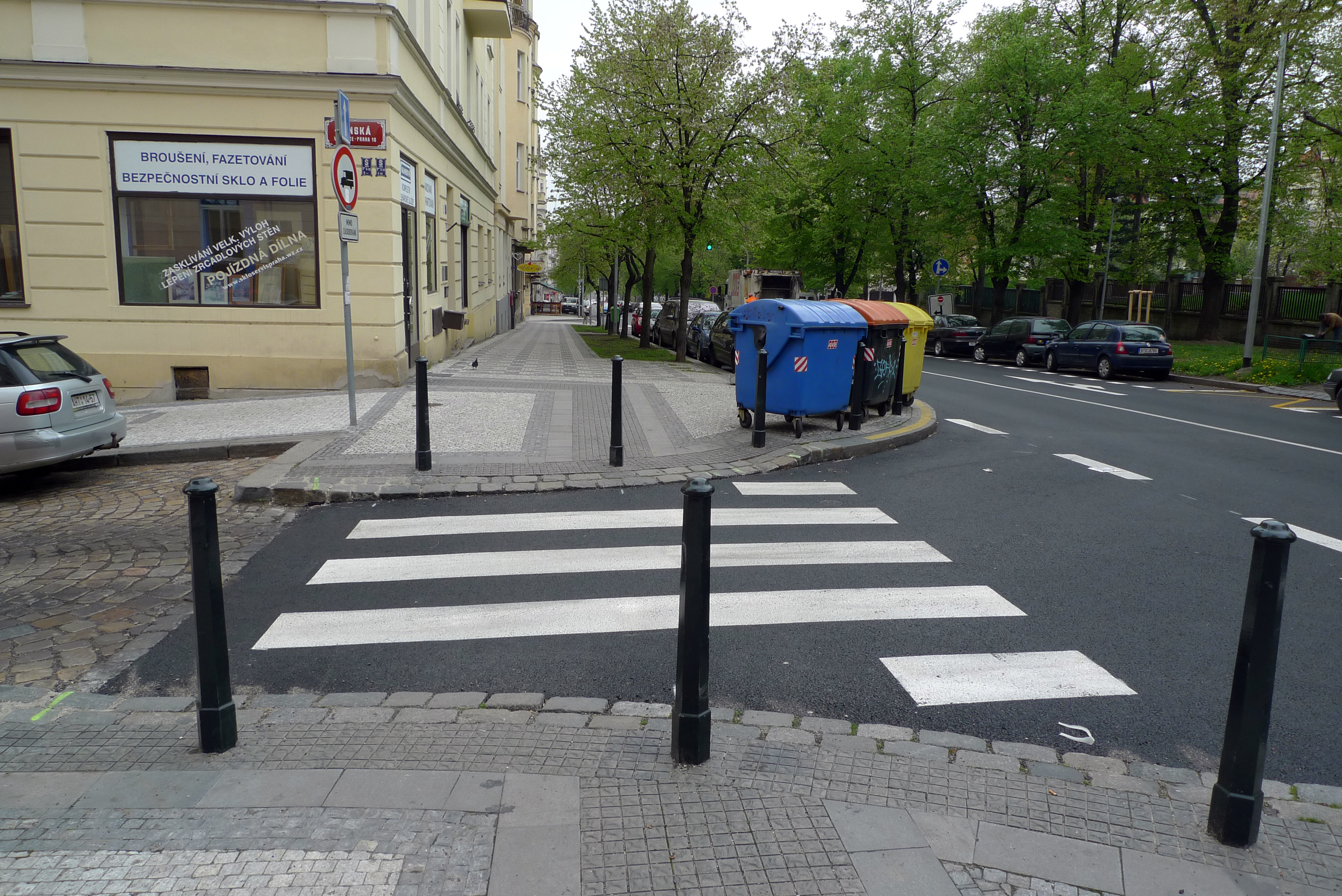 Praha 10, křižovatka ulic Ruská x Finská - úprava přechodu formou tzv. krtčích uší.